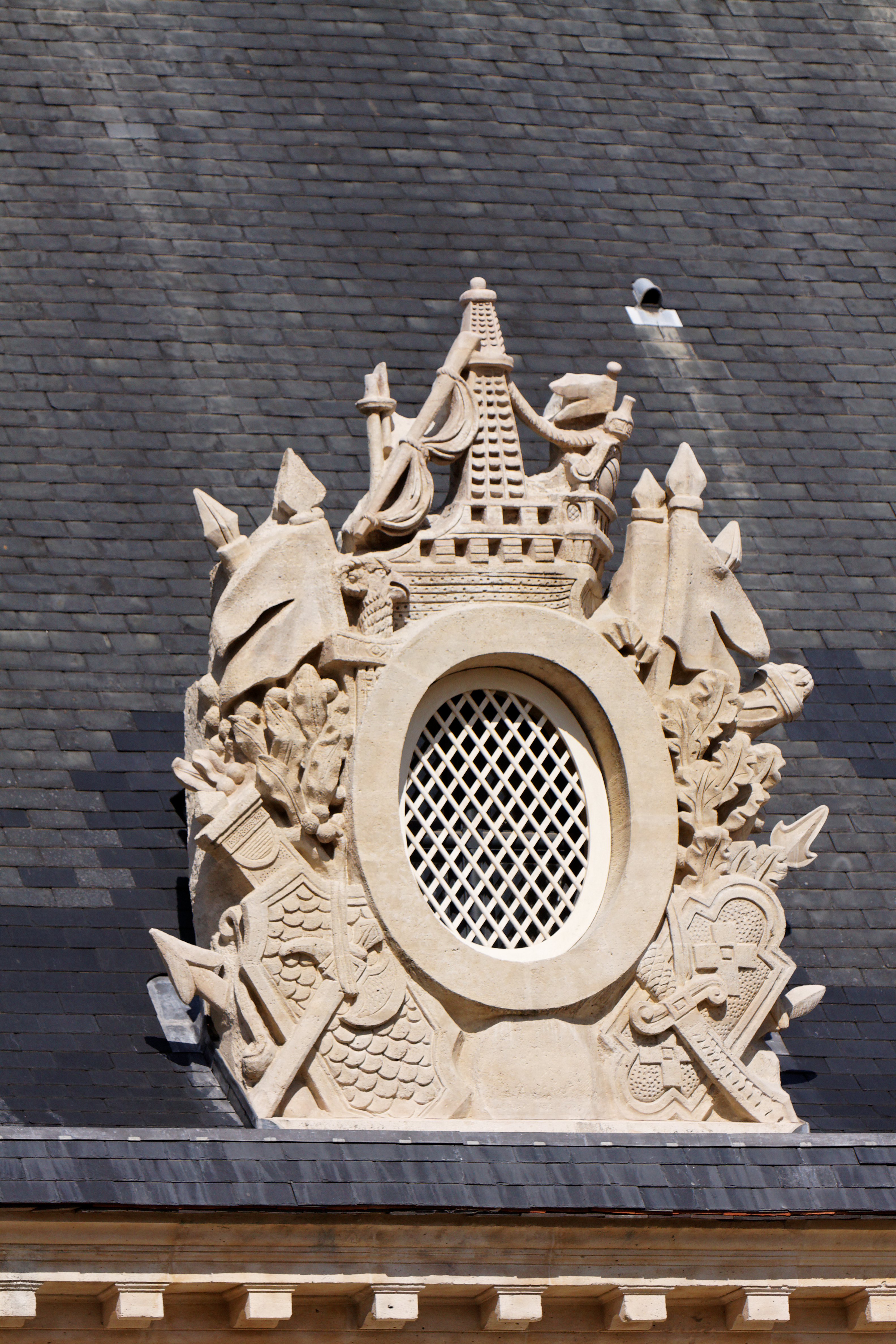 Une vue des Invalides à Paris.